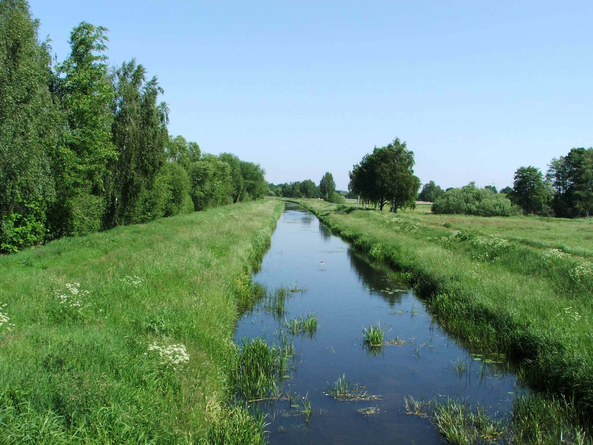 River Kleine Röder (Schwarzgraben) am km 1,3